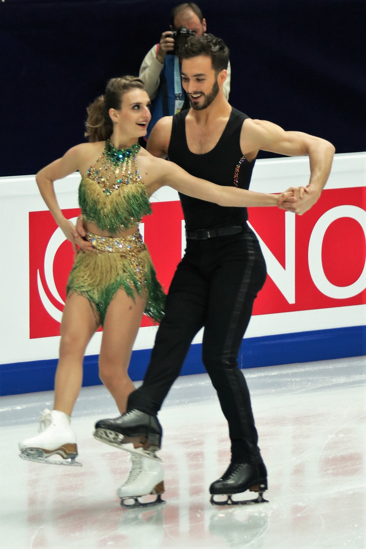 Габриэлла Пападакис / Гийом Сизерон (Франция) на Чемпионате Европы по фигурному катанию 2018.